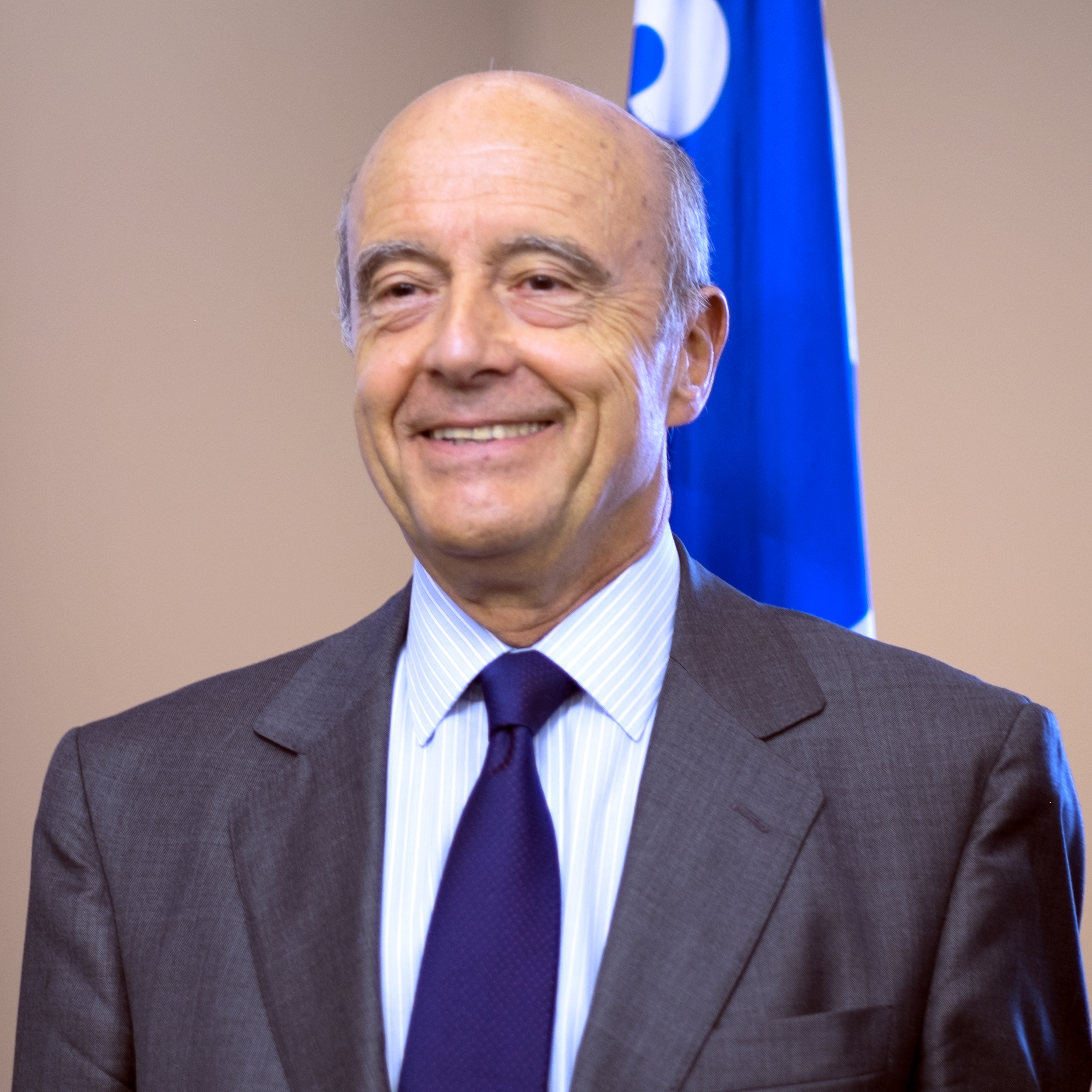 portrait d'Alain Juppé à Québec en 2015